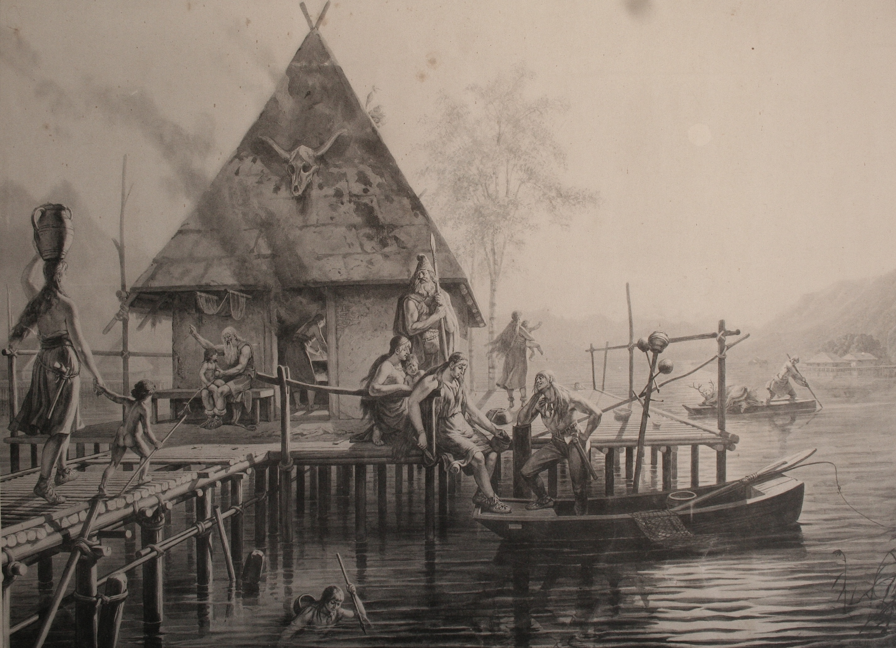 «Pfahlbauer» auf einer Darstellung des Historienmalers Karl Jauslin